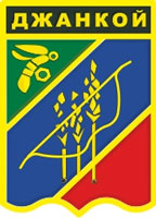 Герб города Джанкоя. Утверждён Решением Джанкойского городского Совета от 30 марта 2007 года №375